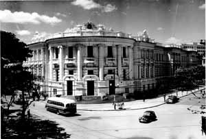 ICBS - Instituto de Ciências Básicas da Saúde